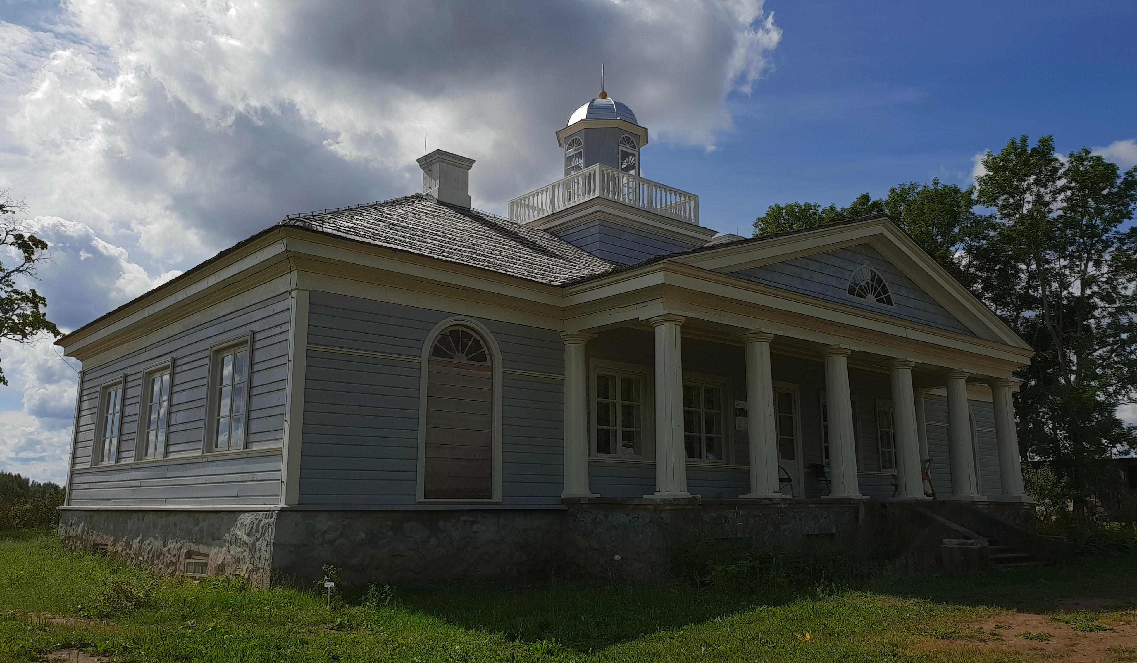 Ērmaņi mõisa peahoone 2018. aastal